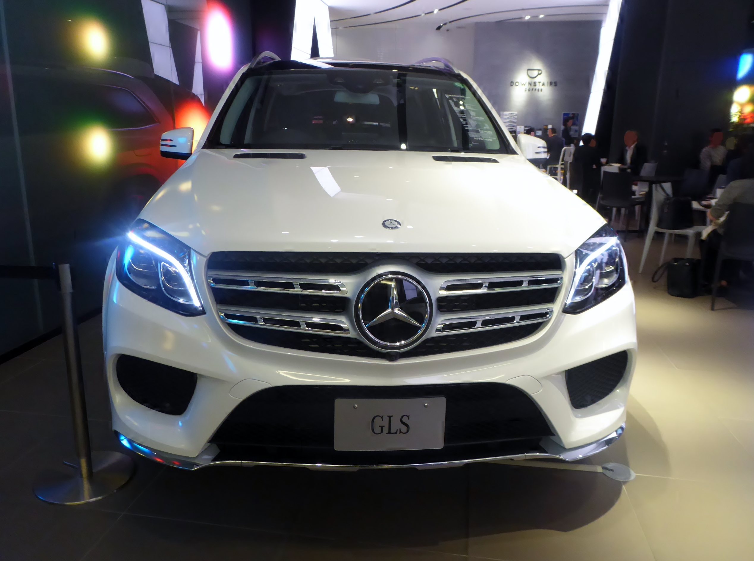 X166型メルセデス・ベンツ・GLS350d 4MATICスポーツをフロントから撮影。